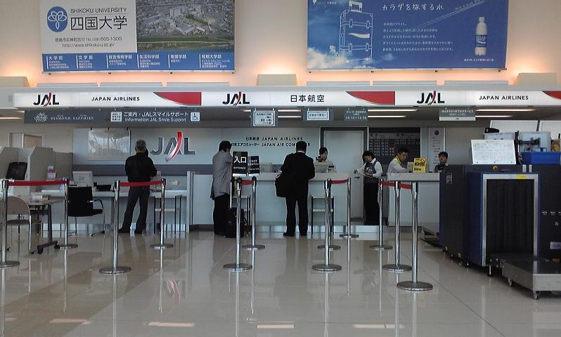 徳島阿波おどり空港内にあるJALカウンター。